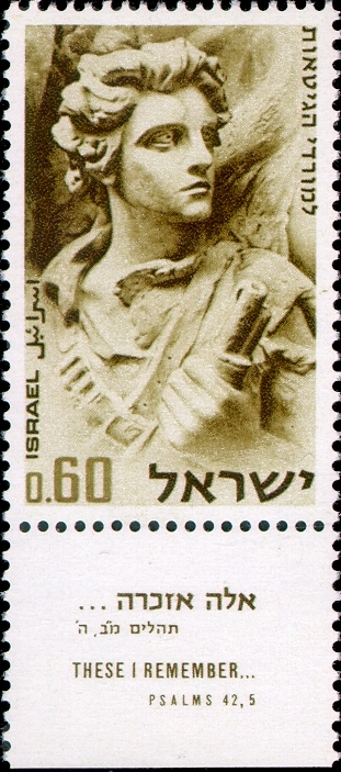 בול מרד הגטאות